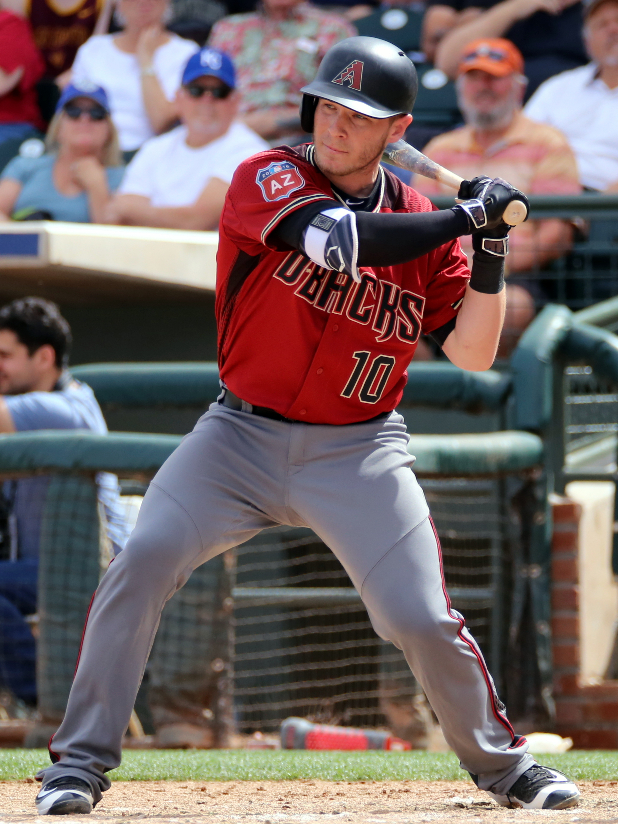 Chris Herrmann